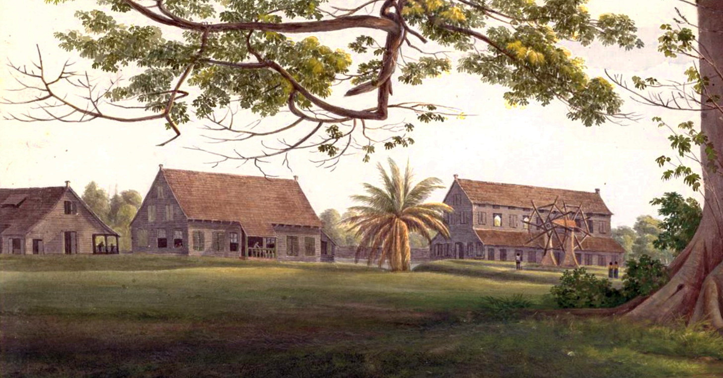 Detail van een aquarel van de plantage Nut en Schadelijk in het Commewijnedistrict in Suriname, geschilderd door Louise van Panhuys tijdens haar verblijf in Suriname als echtgenote van een plantagehouder (1811-1816). Collectie Universiteitsbibliotheek Frankfurt am Main.